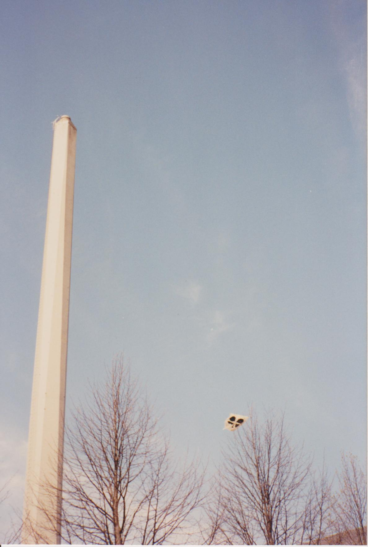 Firkløverflag fra skorstenen på DTU - 18.5.1988